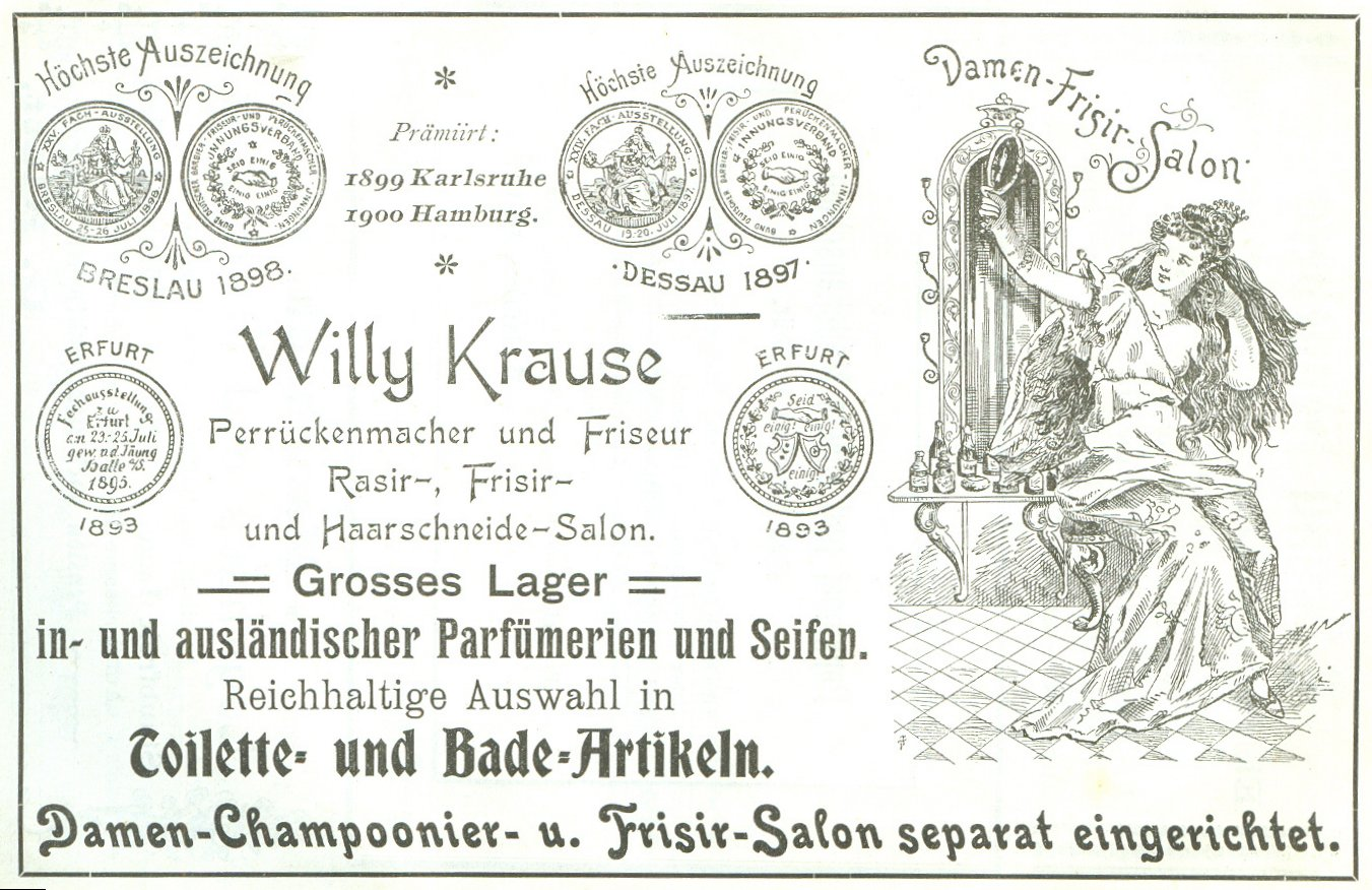 Eine Webeanzeige eines Frisörs von 1901 (Jugendstil).